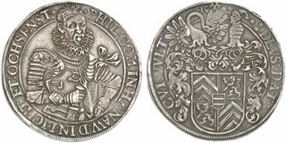 Piece de 1596 à l'effigie de Philippe V de Hanau Lichtenberg